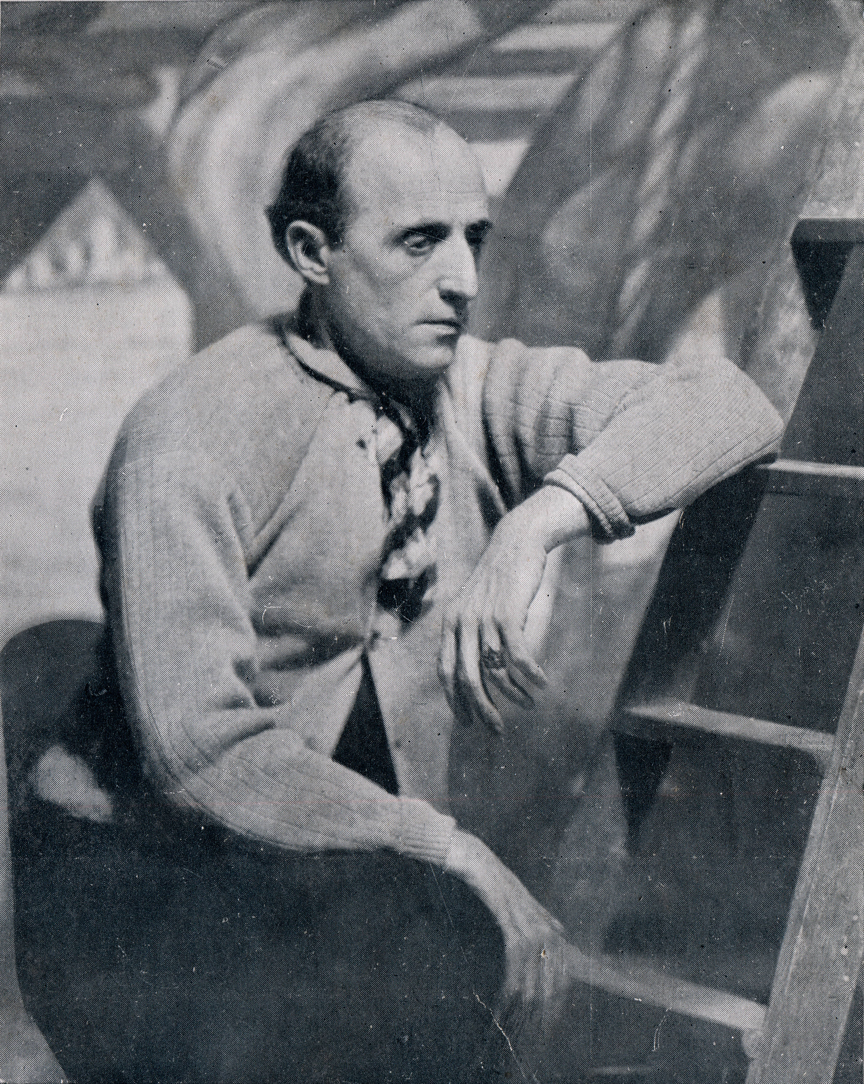 Benito Quinquela Martín en su taller.